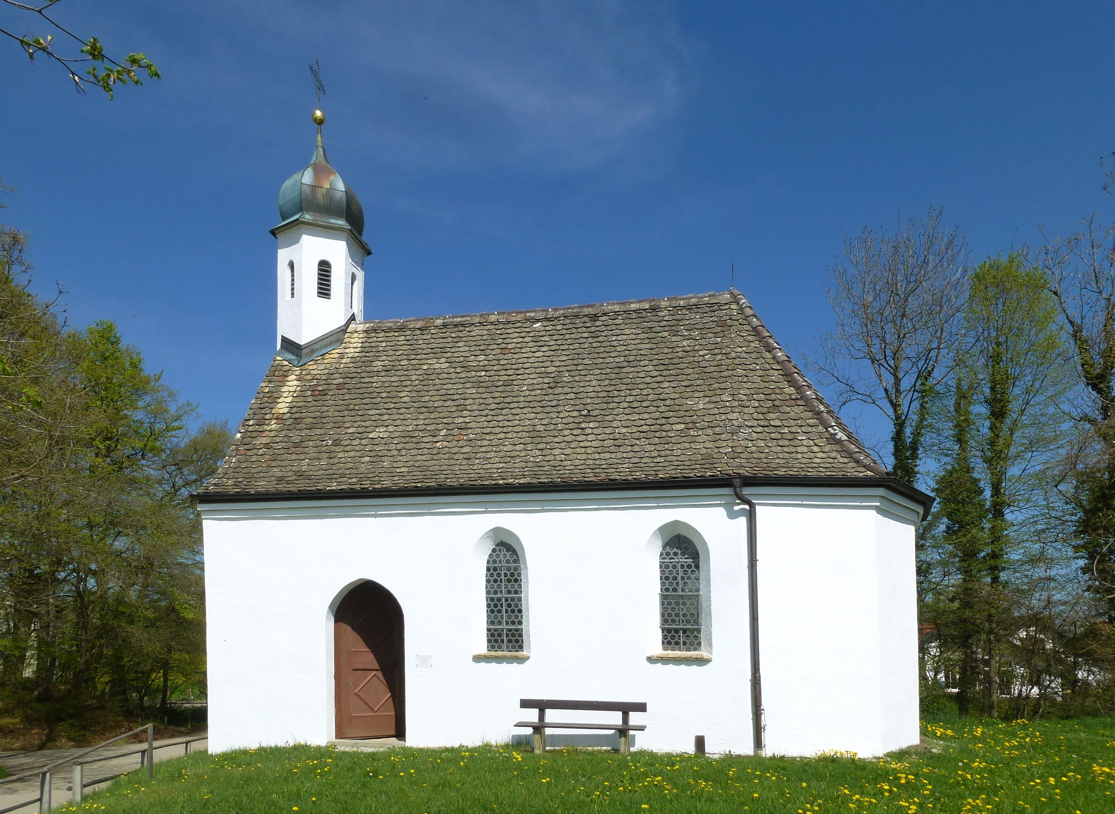 Dießen-Bierdorf_Bierdorf10: Katholische Kapelle Mariä Heimsuchung. Ansicht von SSO